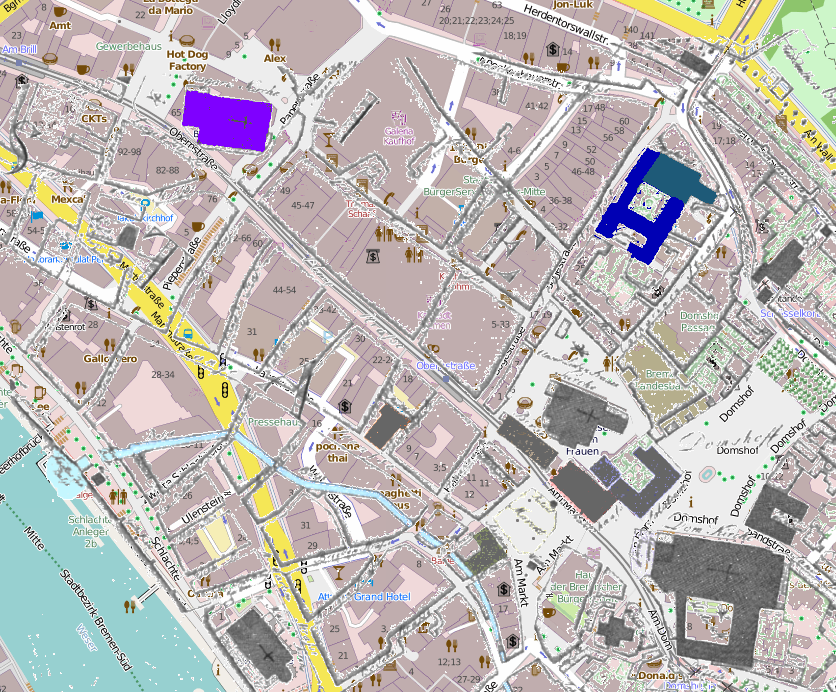 Teil des Murtfeldtplans von Bremen aus dem Jahr 1796 auf Nord gedreht und im Maßstab angepasst auf den entsprechenden Ausschnitt von Openstreetmap gelegt, Lila = Ansgarikirche, blau = freie Lateinschule (ehem. Katharinenkloster), blaugrün = Zeughaus (ehem. Katharinenkirche) This map may be incomplete, and may contain errors. Don't rely solely on it for navigation.